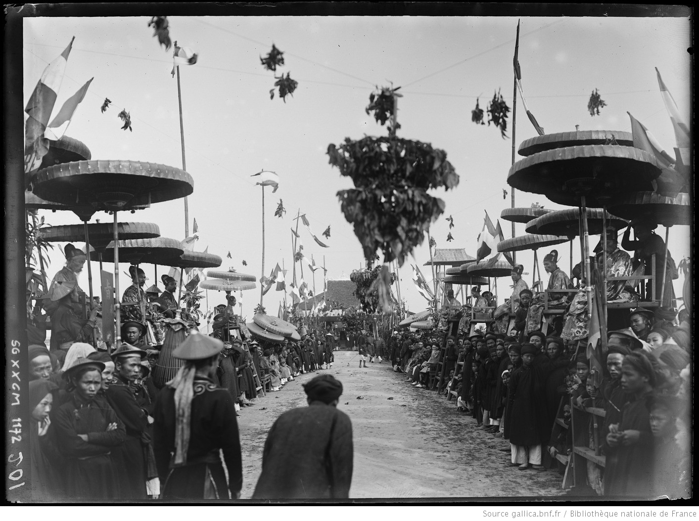 Tonkin. Nam-Dinh. Concours triennal, défilé des lauréats devant les examinateurs / [photogr.] A. S[alles]